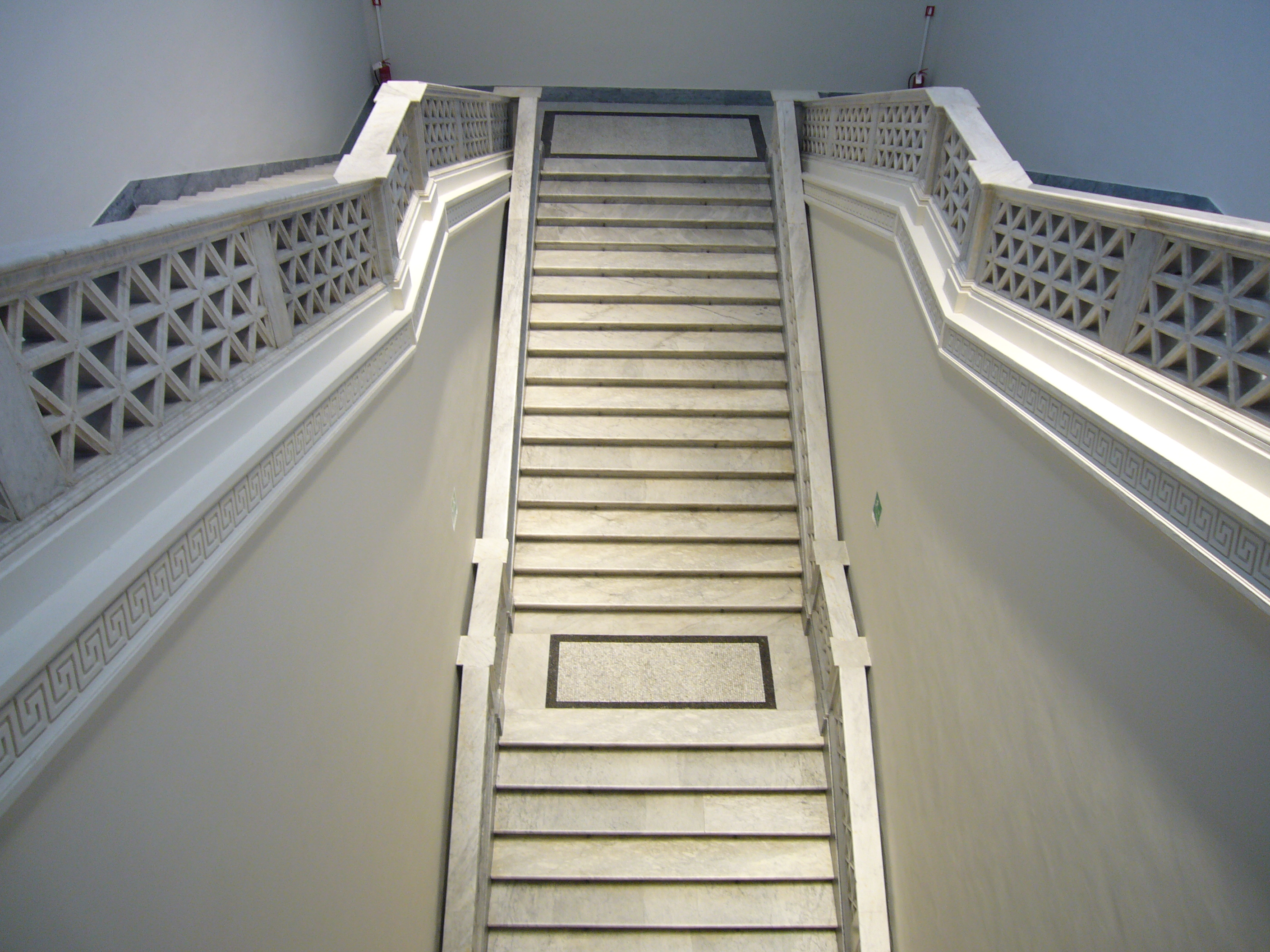 Roma, Palazzo delle Esposizioni - scalone